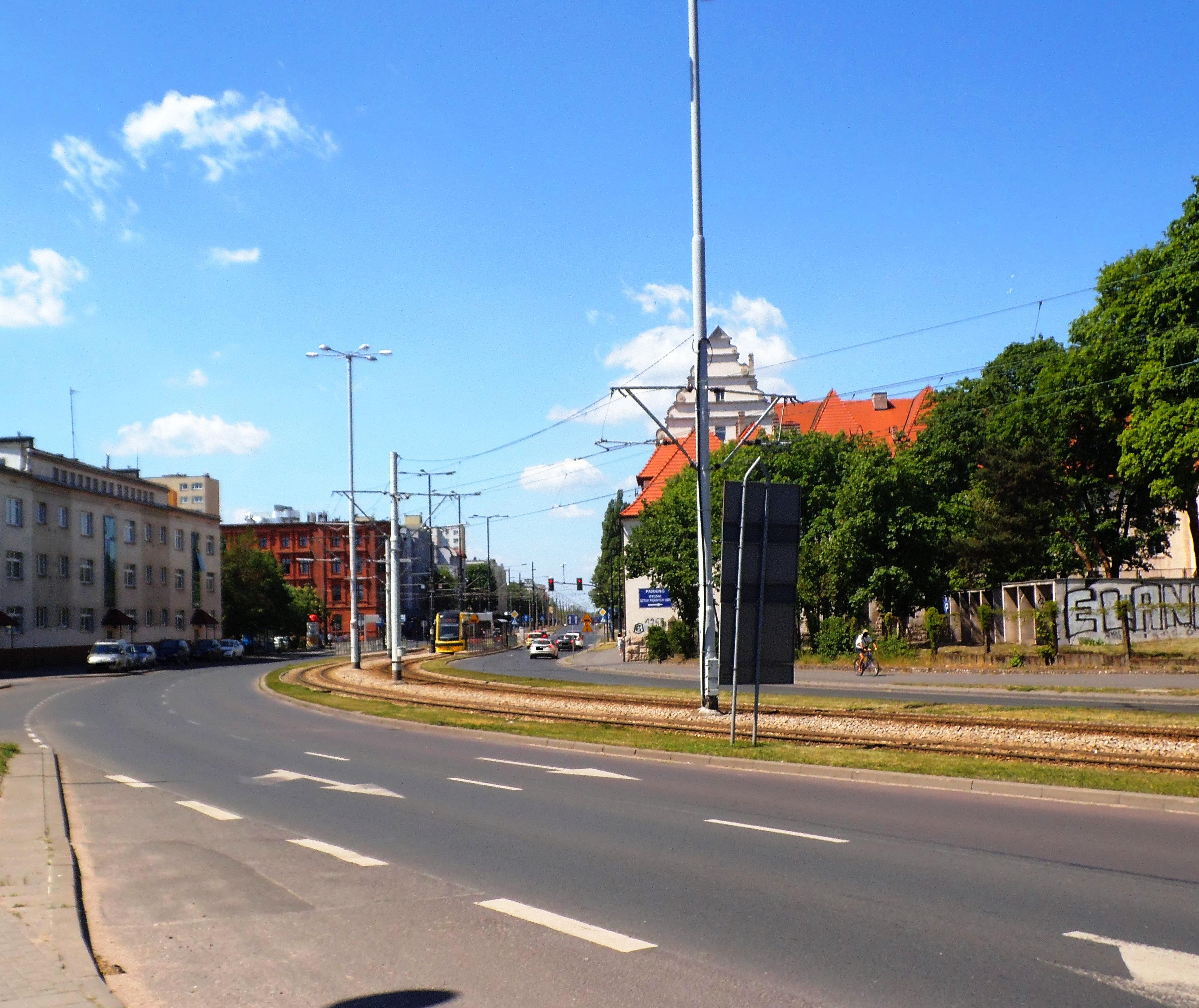 Ulica Bema w Toruniu2